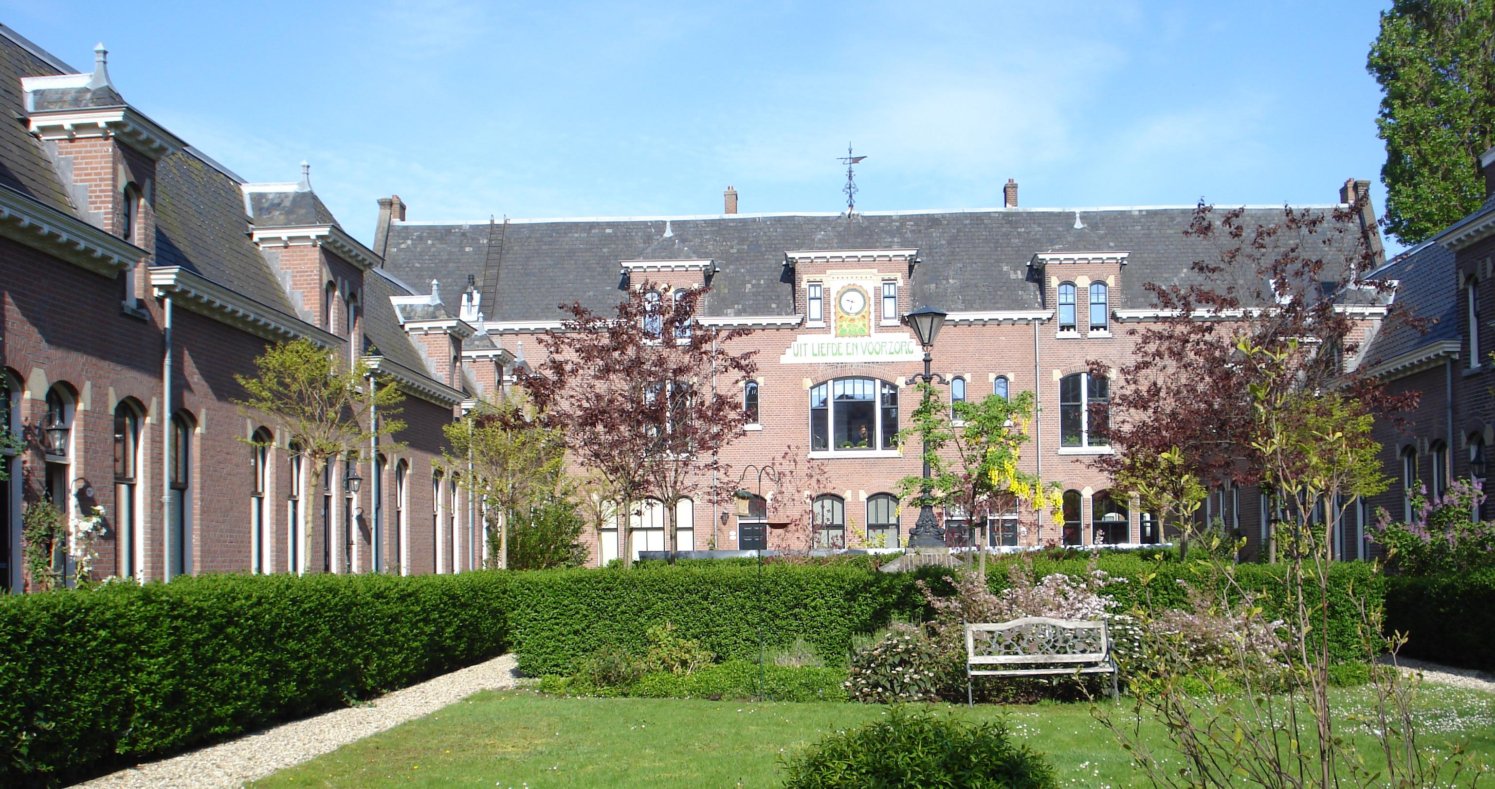 Rotterdam, Hofje Voorschoterlaan 79. Rijksmonument.